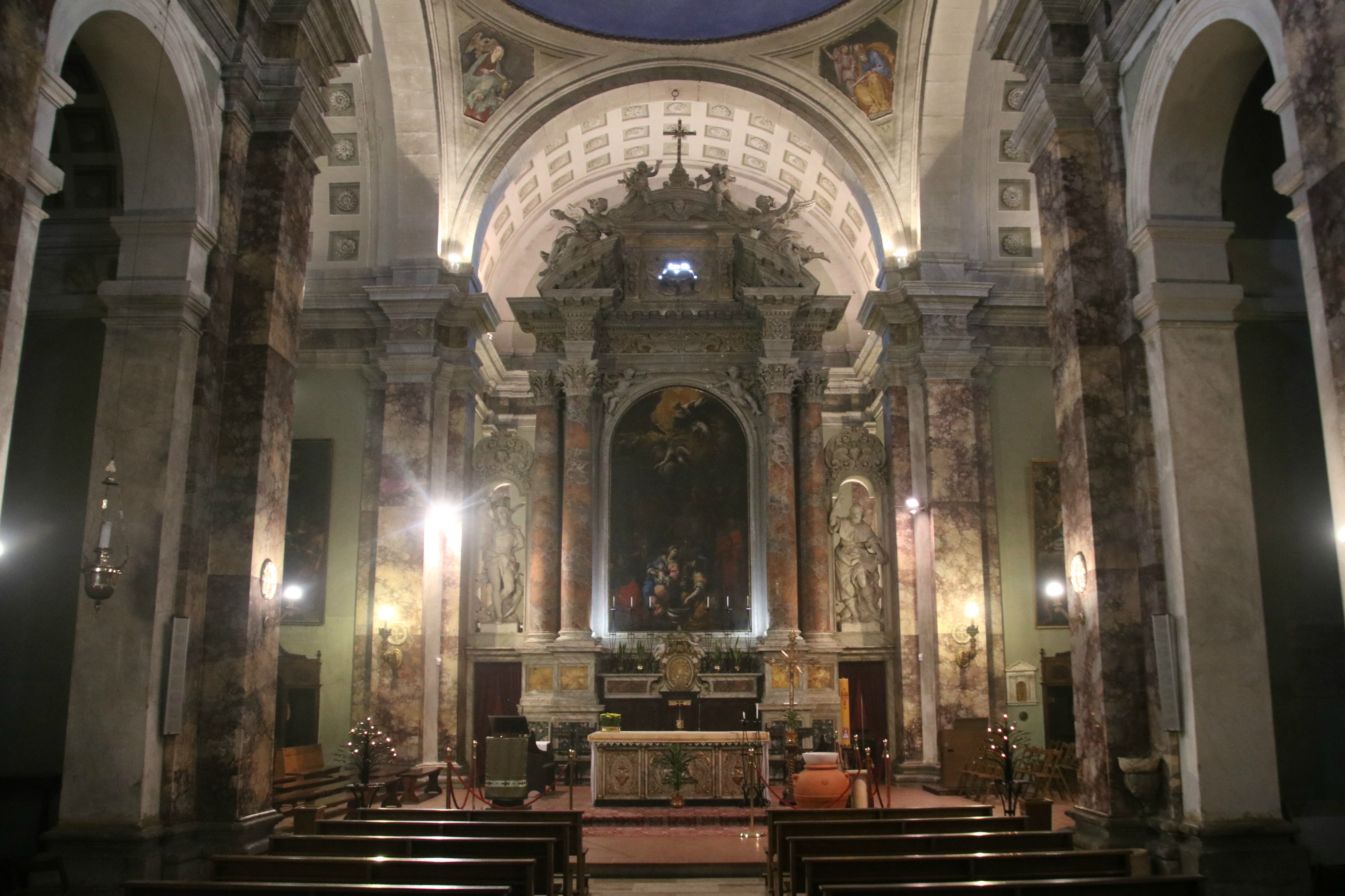 Chiesa della Propositura (Castel del Piano)